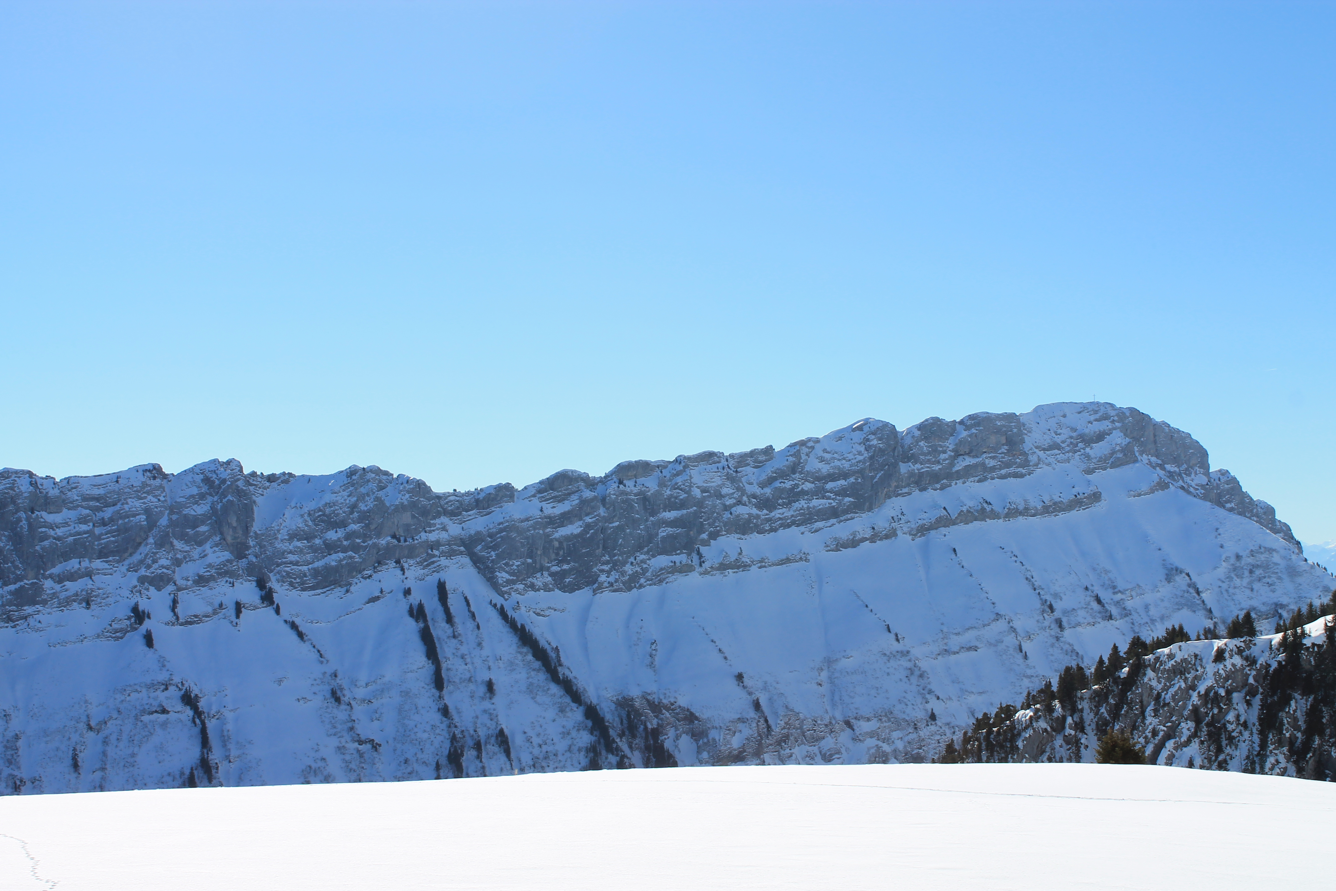 Versant nord de la crête du Mont Lachat (à droite, 2023 m) de Thônes, vu depuis le plateau d'Auges (Plateau des Glières).